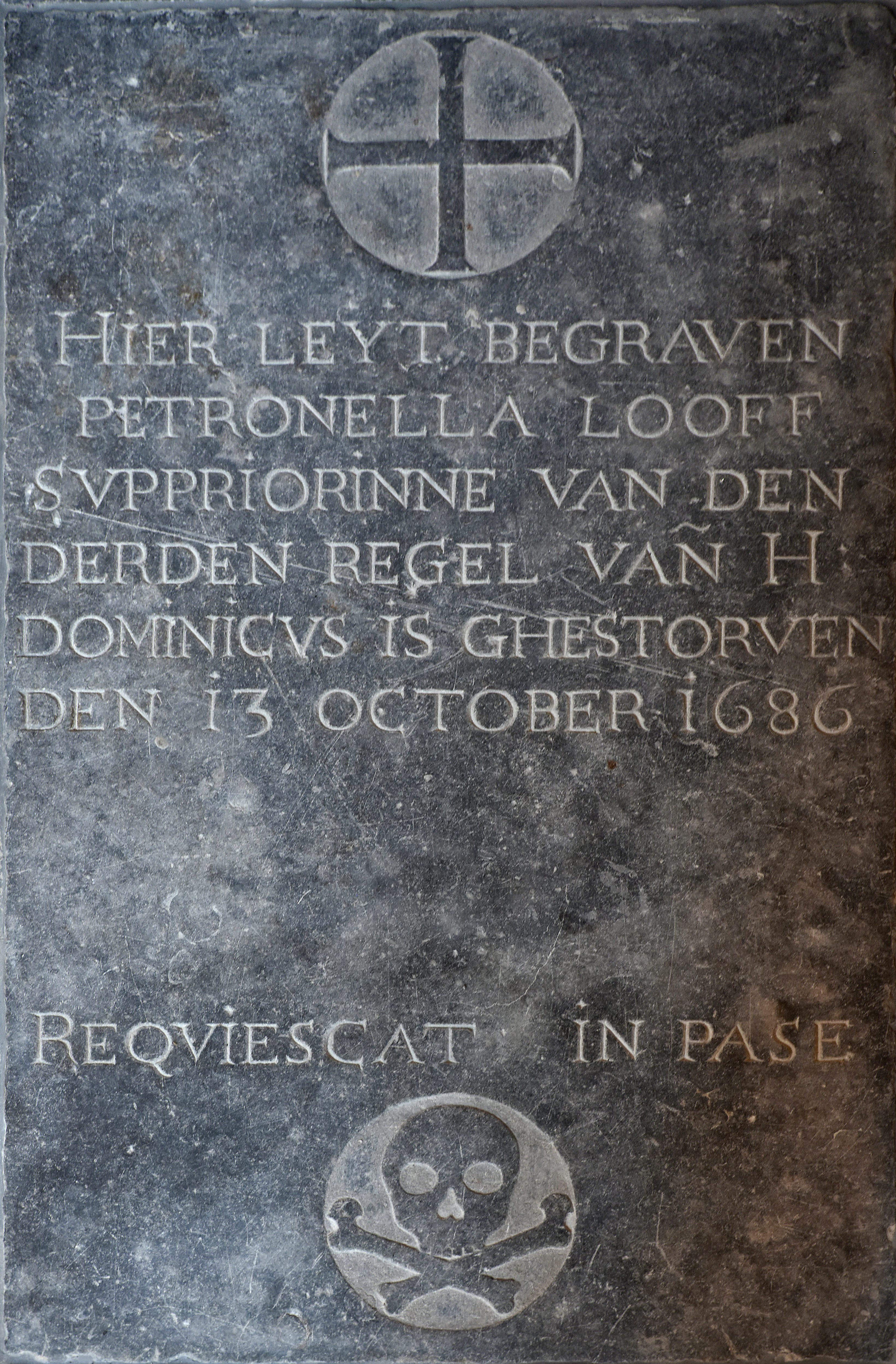 Het Predikheren grafsteen tertiaris (derde orde) Mechelen 13-09-2018 This photo of immovable heritage has been taken in the Flemish Region